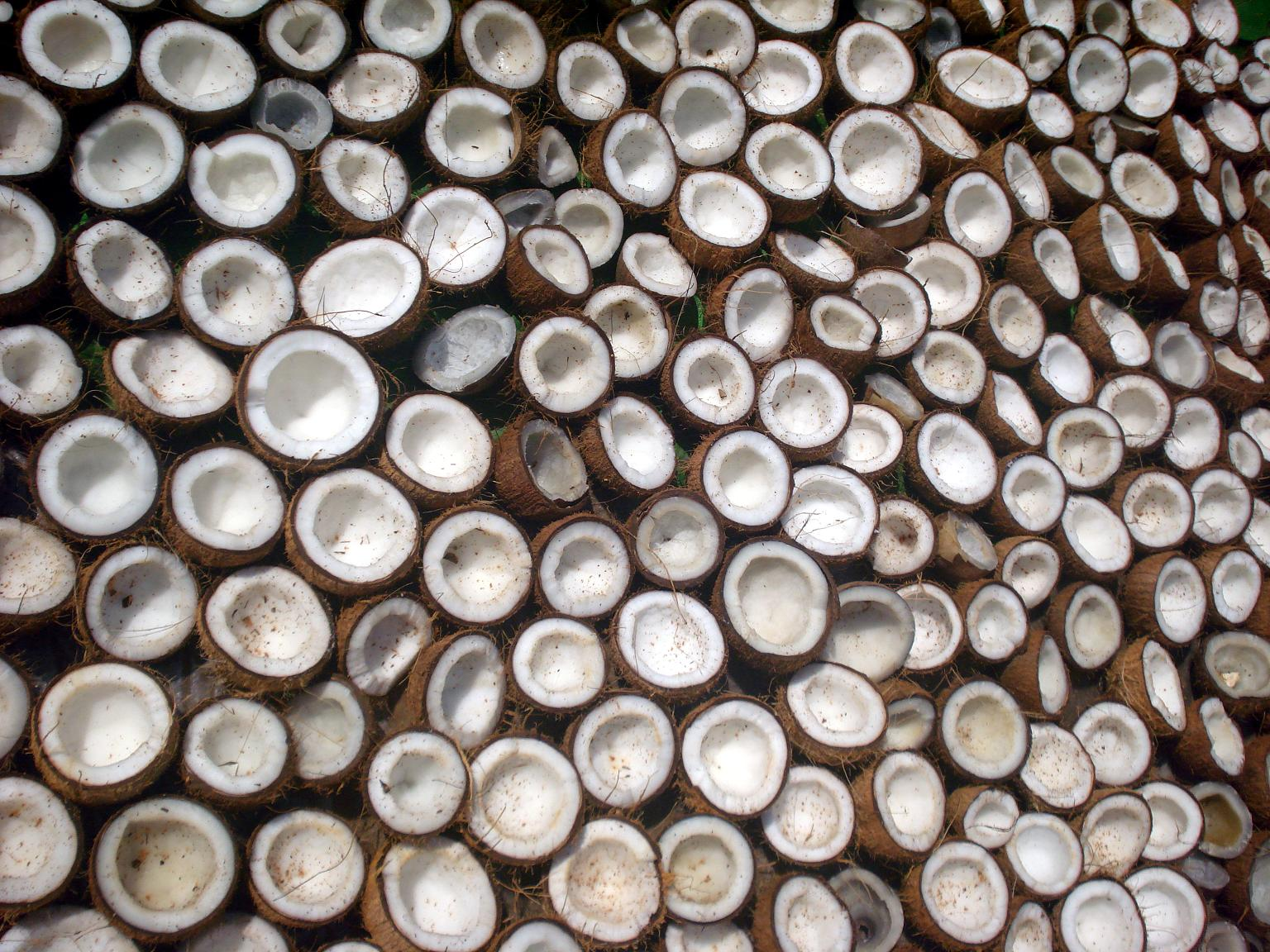 തേങ്ങ ഉണക്കിയ കൊപ്രകൾ